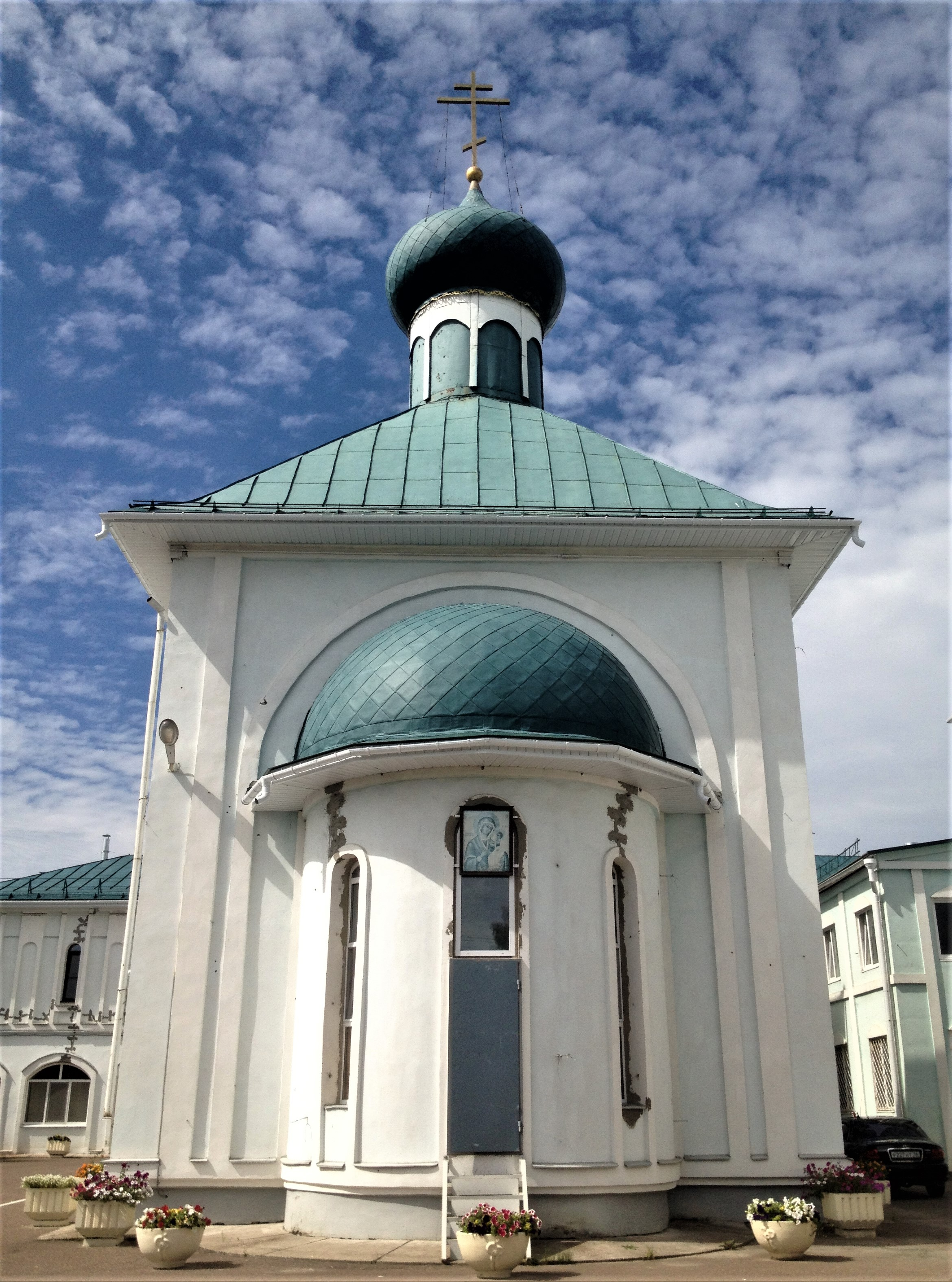 Храм святого праведного Иоанна Кронштадтского при Казанской православной духовной семинарии (г. Казань, ул. Челюскина, д. 31 а).